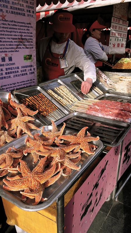 Delicious Beijing Snacks